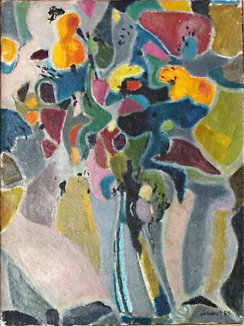 Nature morte réalisée à Cachan par le peintre Jean VImenet en 1962.